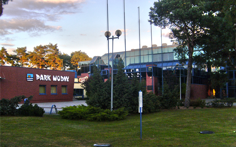 Widok na OSiR i basen w Solcu Kuj.